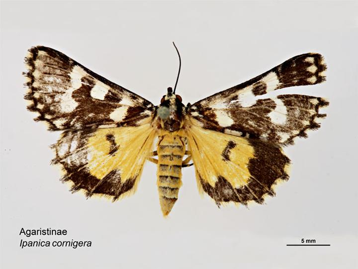 Ipanica cornigera, dorsal view.